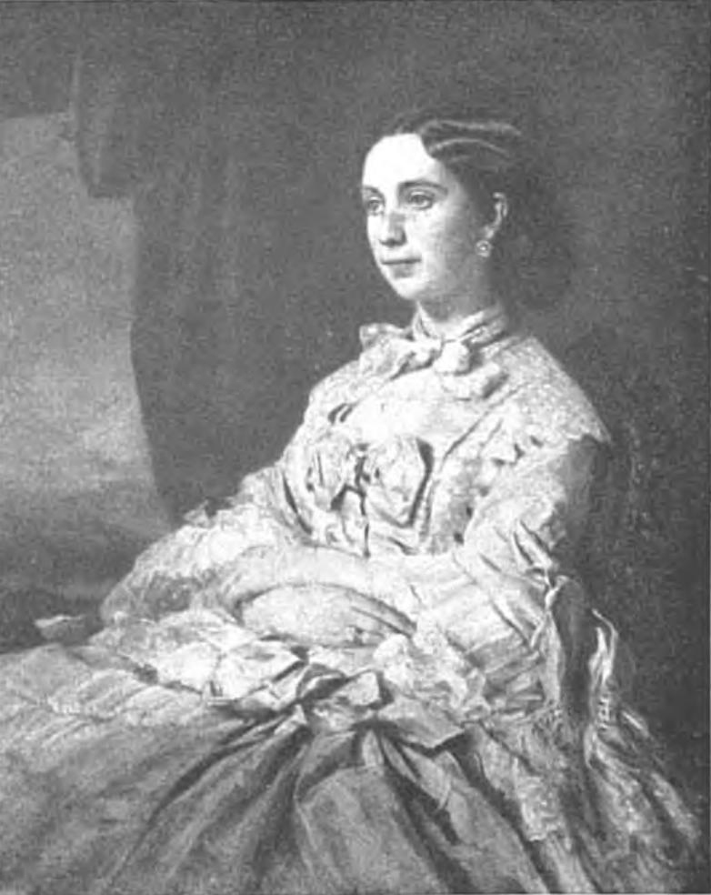 Графиня Елена Ивановна Шувалова, ур. Черткова (1830-1891), жена П. А. Шувалова (1827-1889), в первом браке за М.В.Орловым-Денисовым (1823-1863).